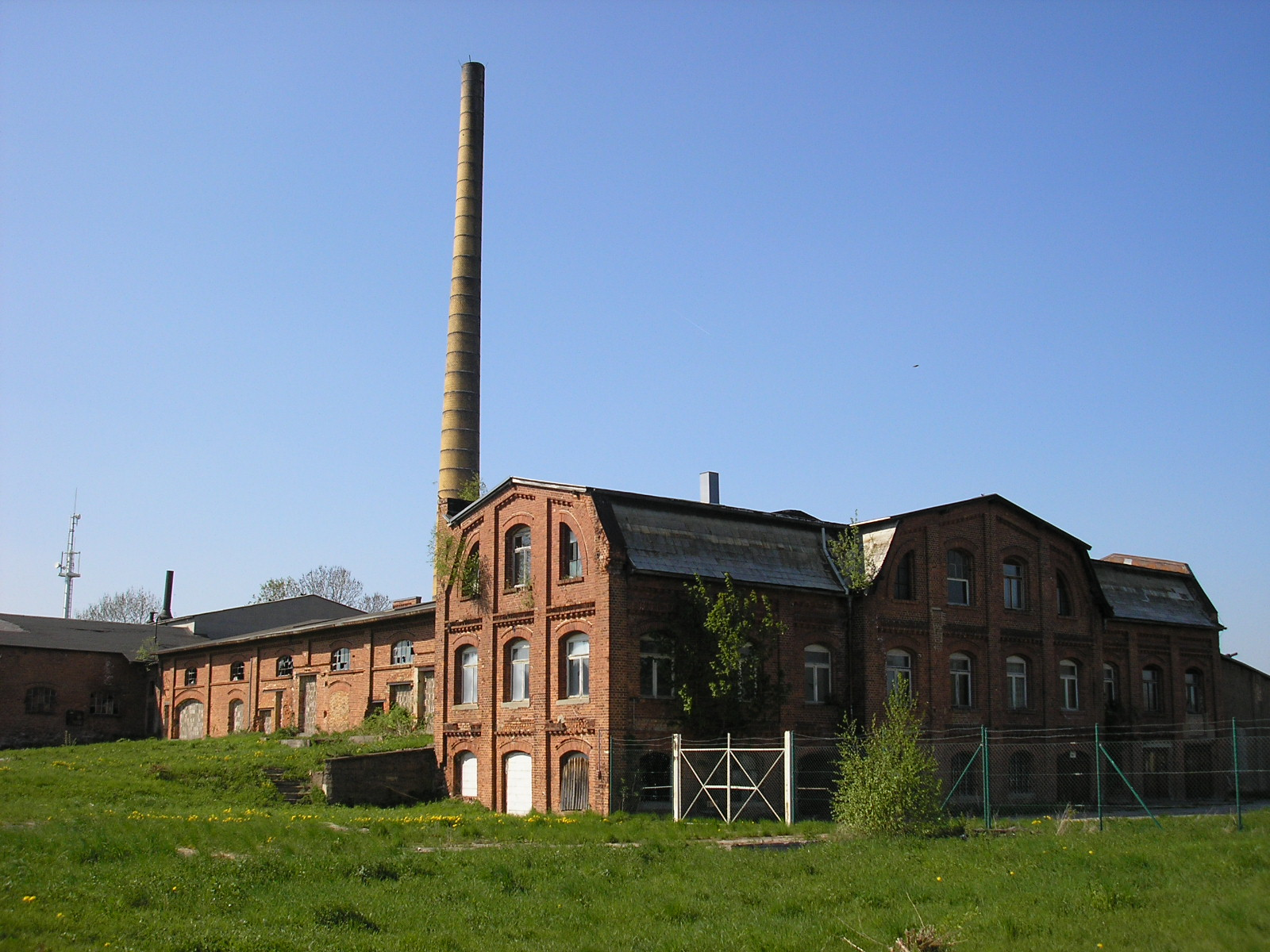 Ehemaliges Holzwerk von Gehren (Thüringen).